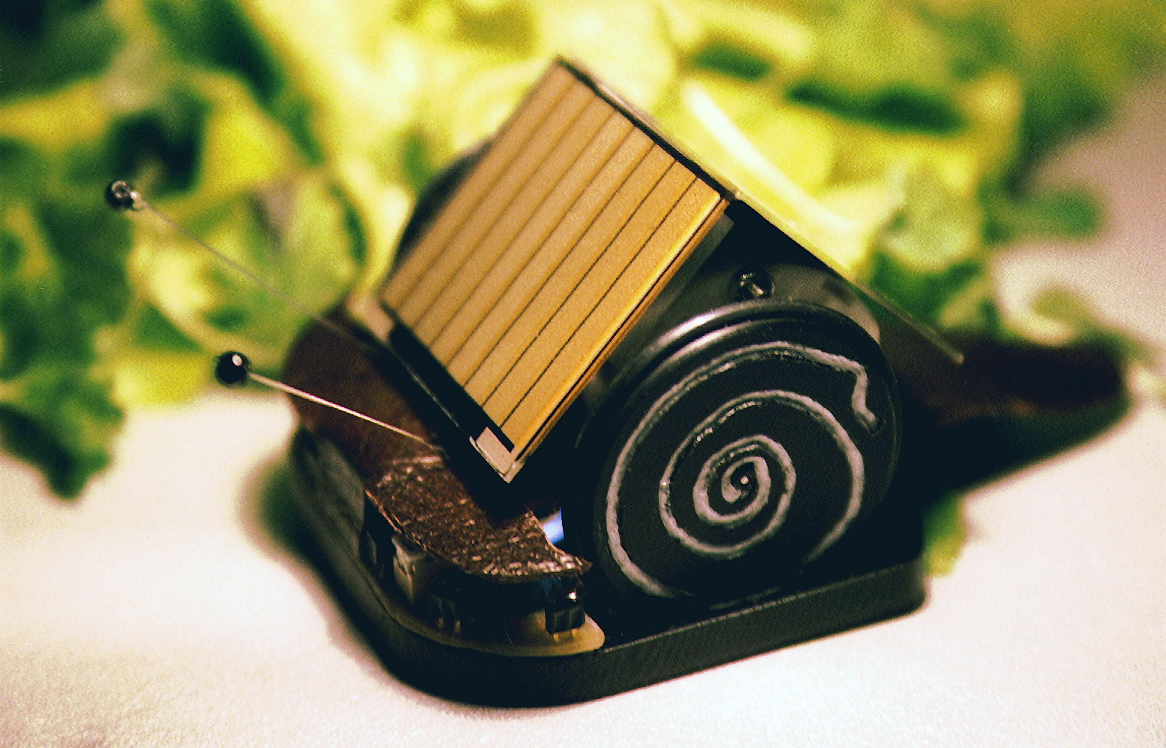 Rainer Paadi ja kunstnik Nerva loodud robottigu "Digitigu"